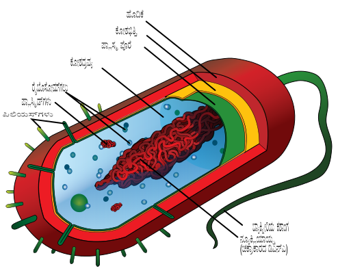 ಕನ್ನಡ: ಮಾದರಿ ಪ್ರೋಕ್ಯಾರಿಯೋಟ್‌ ಜೀವಕೋಶದ ರಚನೆ